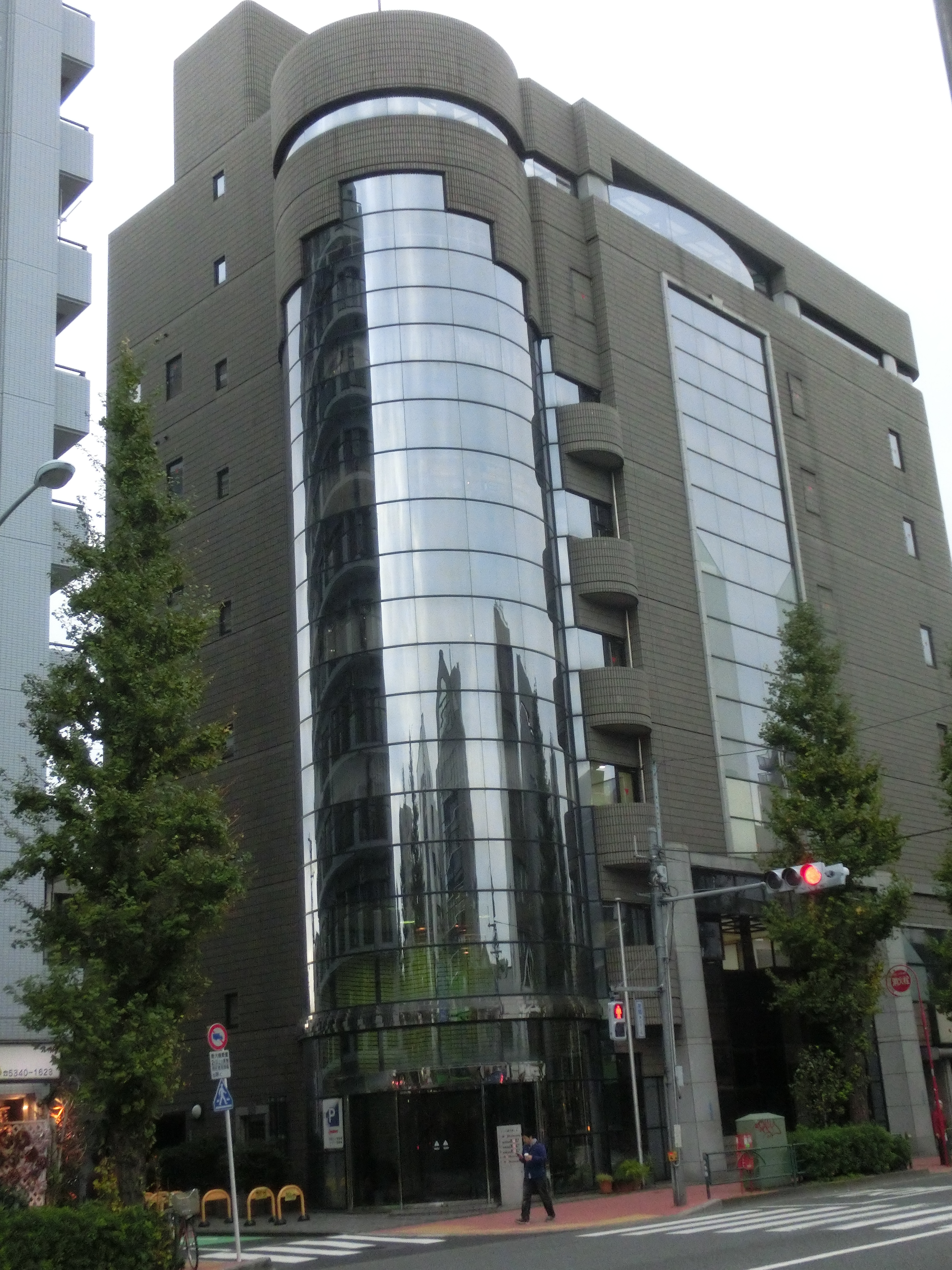 SAN新中野ビル